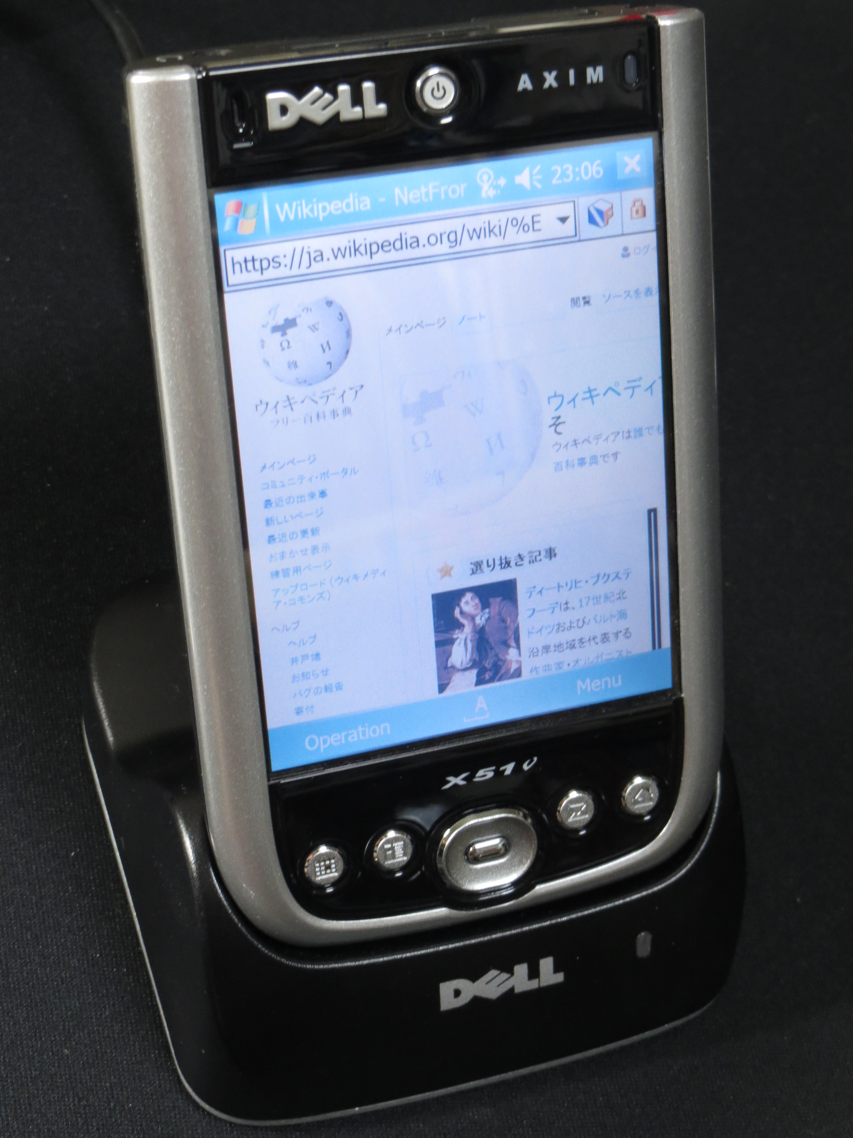 DELL AIXM X51v